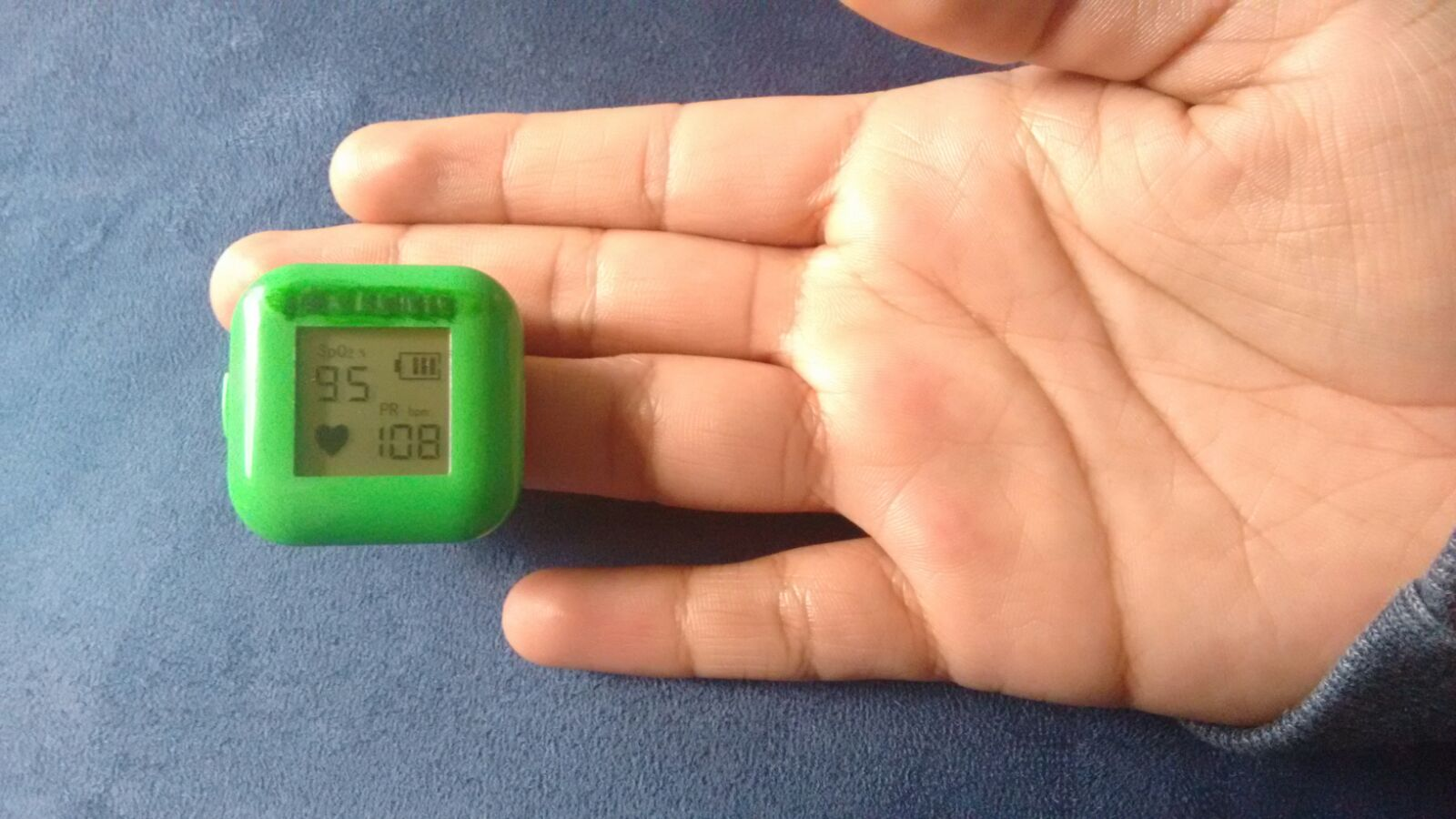 Funcion